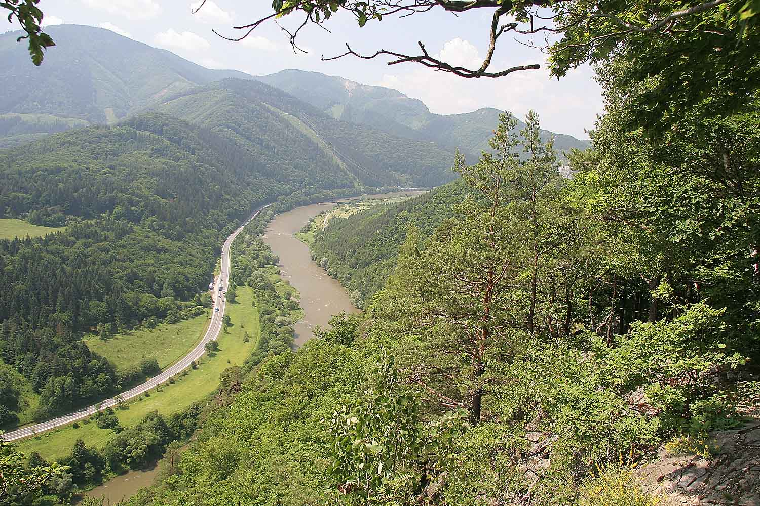 Castle Starý hrad, view of Domašínský meander, district Žilina, Slovakia autor:Prazak date: 28. 6. 2006